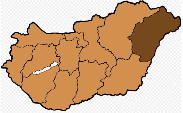 Mappa dell'arcidiocesi cattolica di Debrecen-Nyiregyhaza, in Ungheria. Lavoro personale eseguito da questa immagine di Commons.